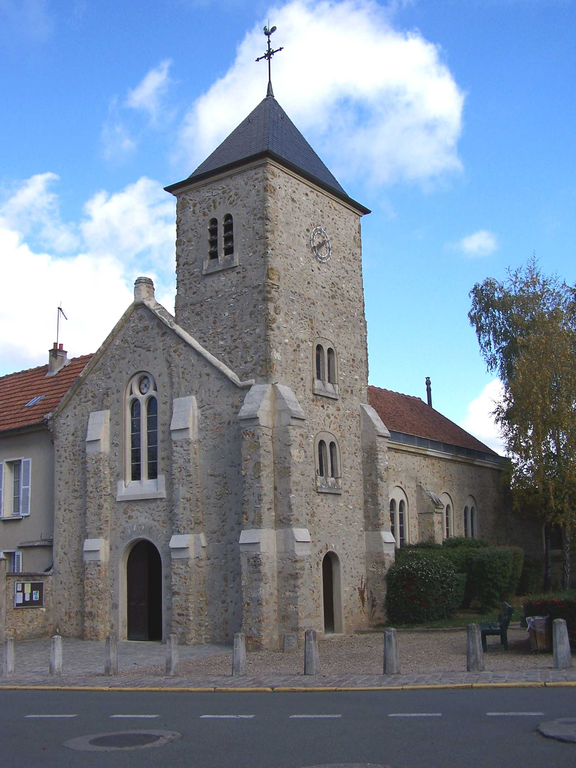 Église des Loges-en-Josas (Yvelines, France)